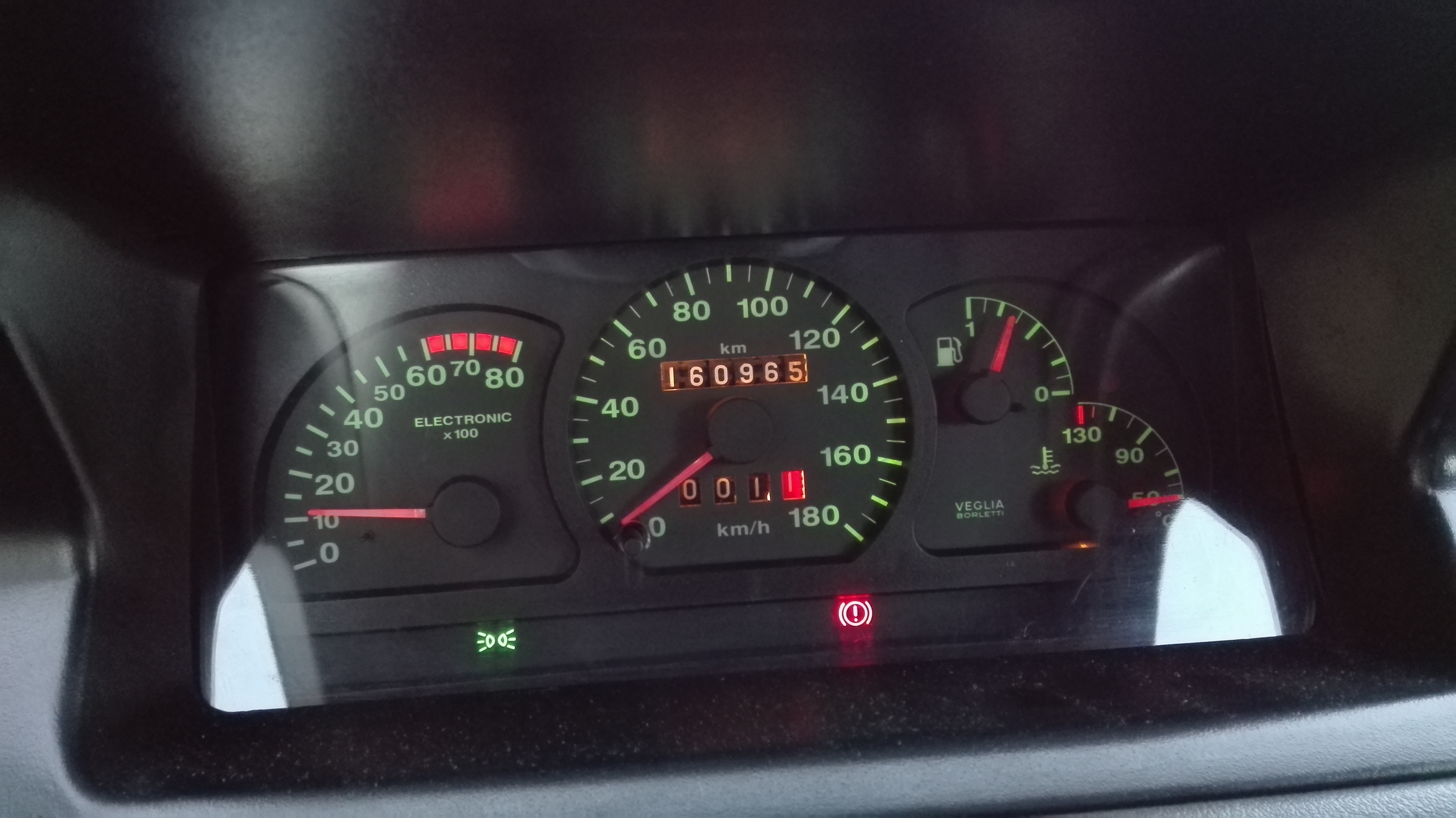 Compte tours au programme